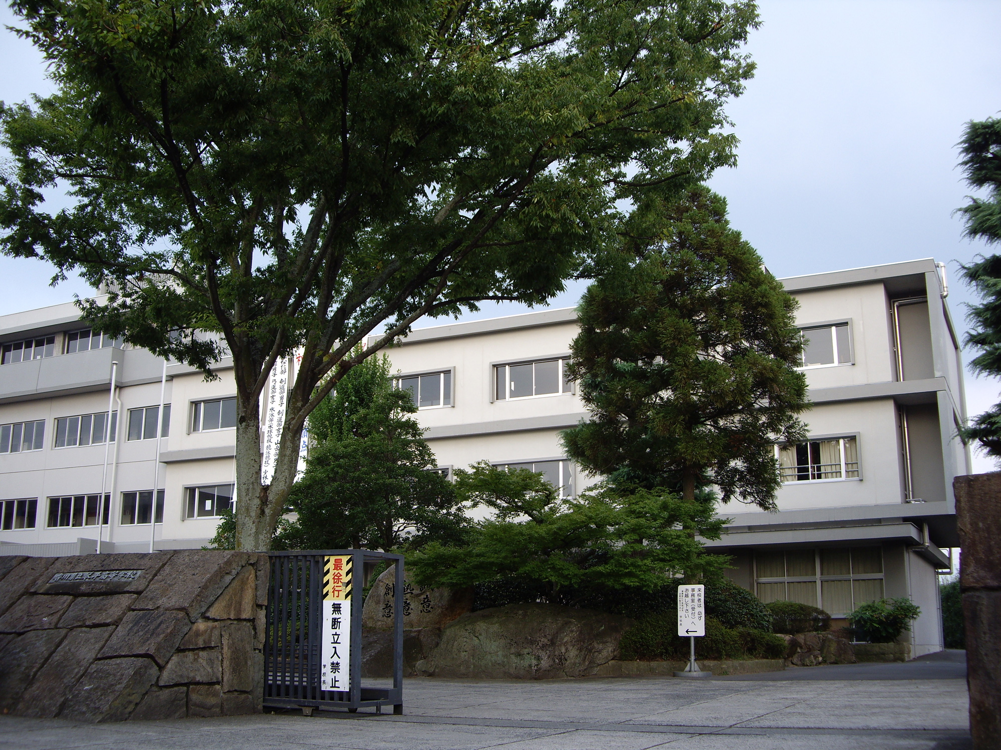 香川県立琴平高等学校 - 日本国香川県琴平町